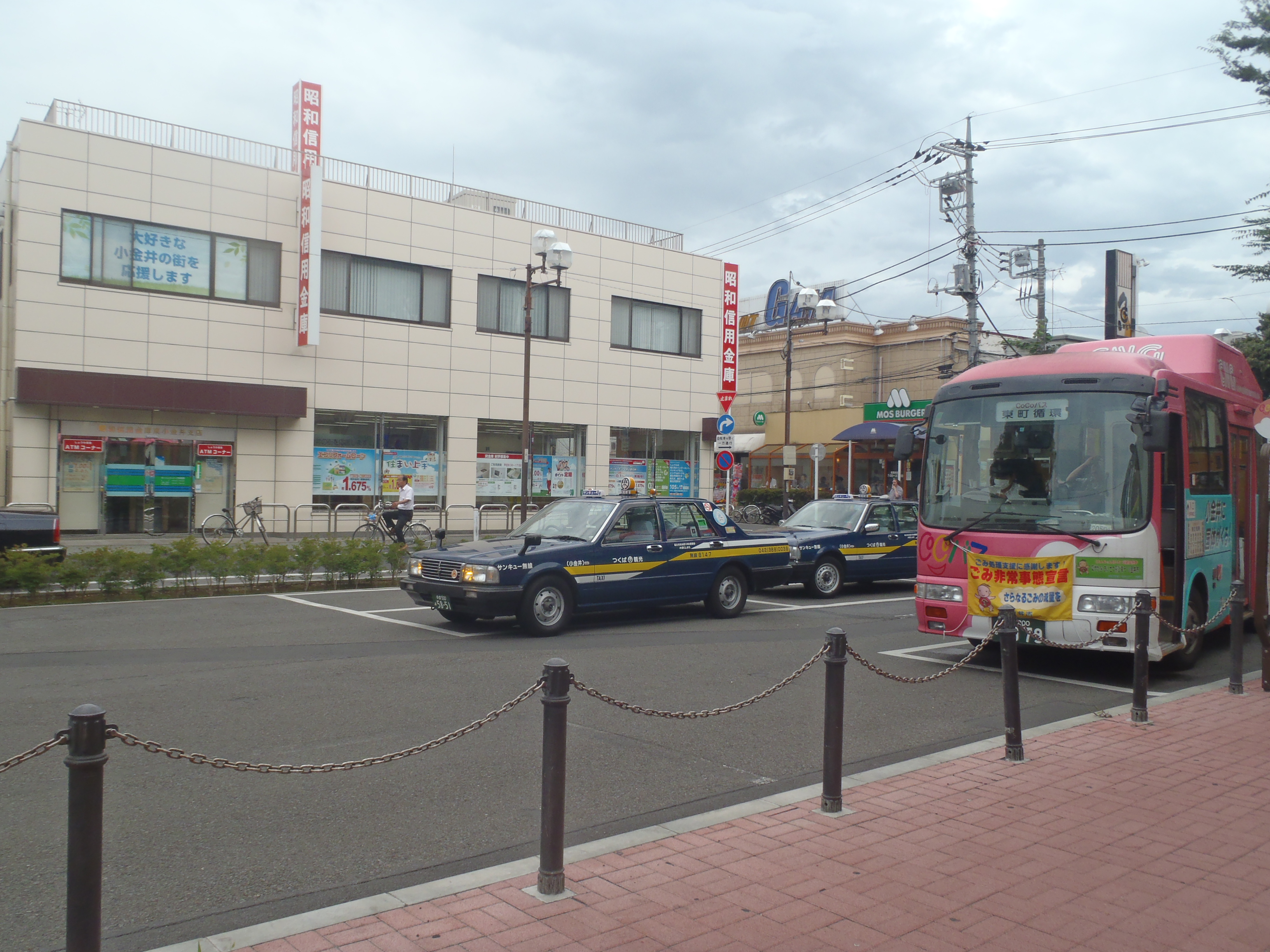 東小金井駅南口のバス停で、ココバスが発車を待っている